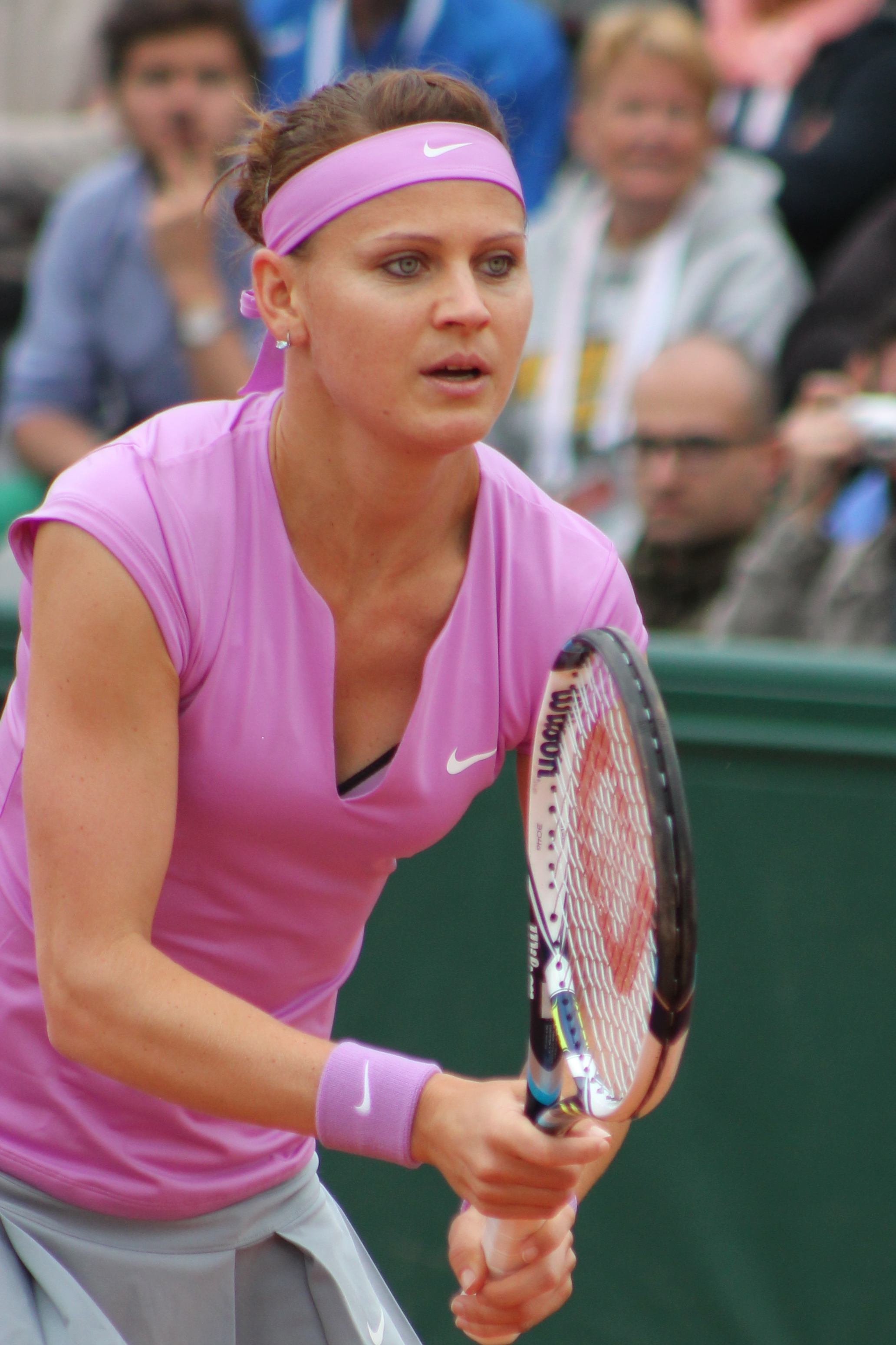 Safarova RG15 (4)